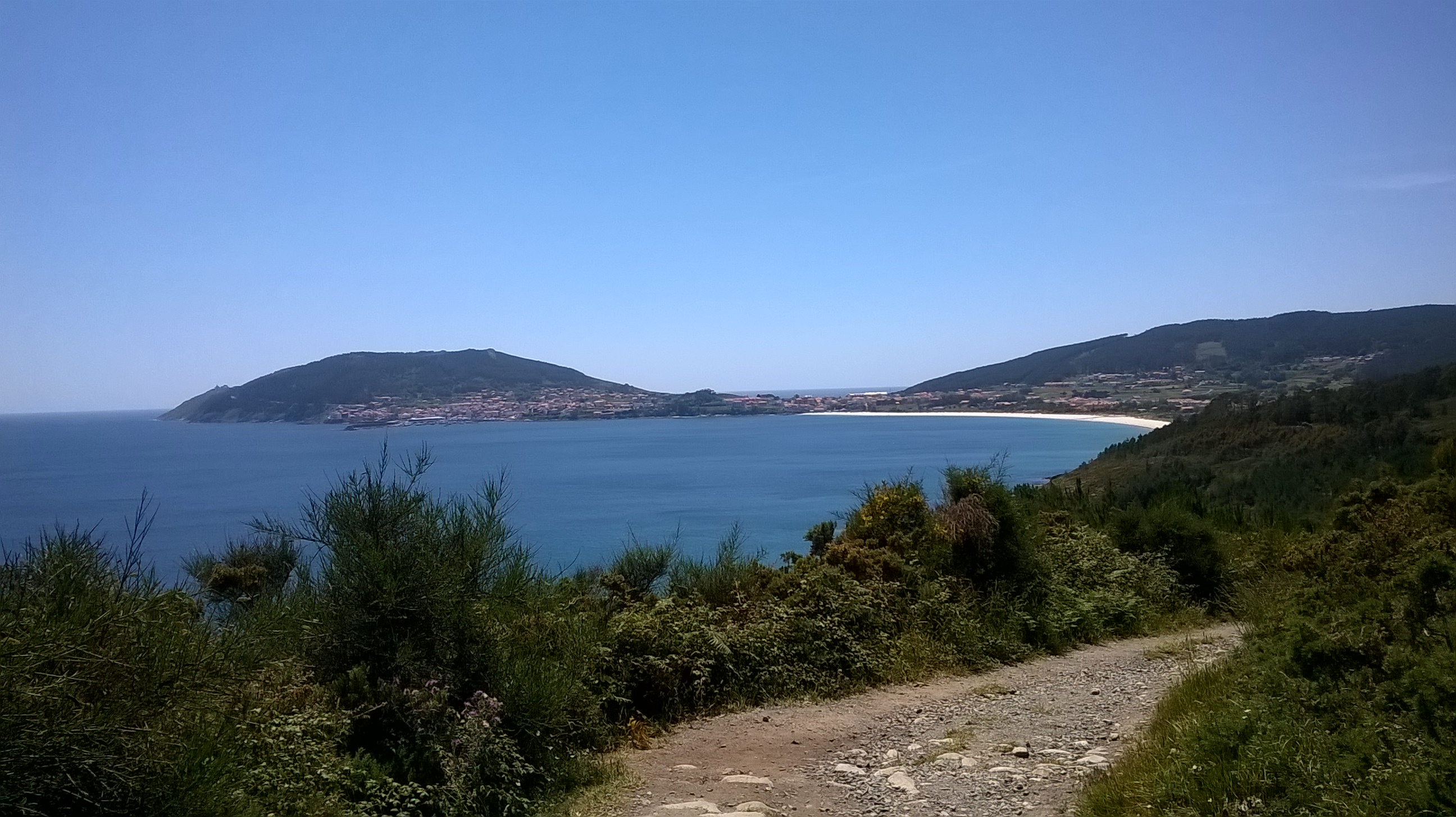 No Camiño de Fisterra aparece, ó lonxe, o destino do peregrino. Á esquerda, o Faro; no centro, Fisterra; á dereita, a praia de Langosteira.